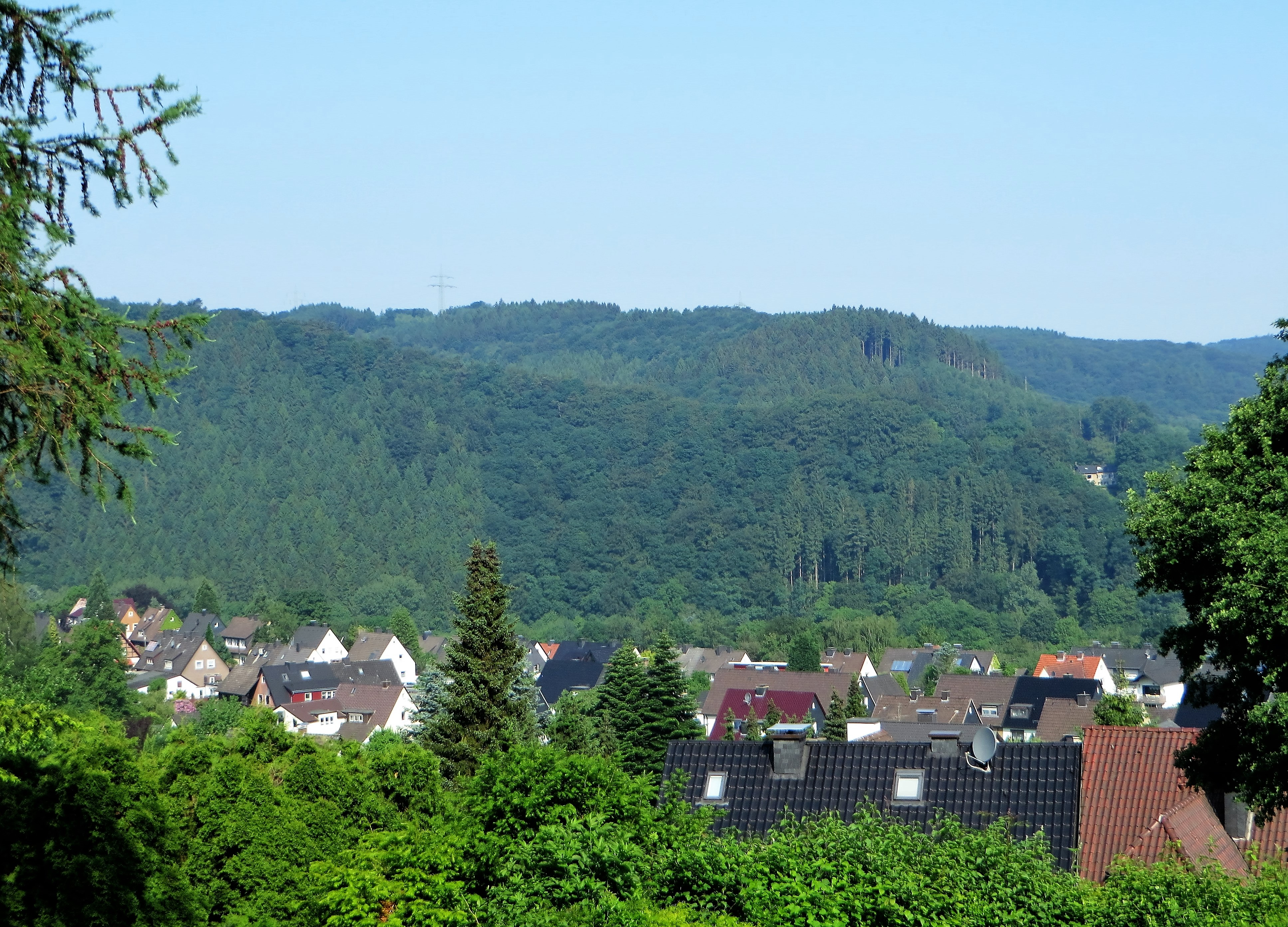 Landschaftsschutzgebiet „westlich Priorei“ in Hagen. Blick vom „Am Hasenhagen“ über den Stadtteil Dahl im Volmetal auf das gegenüberliegende große Schutzgebiet. Es handelt sich um vorwiegend bewaldete Flächen westlich von Priorei mit zahlreichen Quellen und Bachläufen sowie um die landwirtschaftlich genutzten Flächen bei Kalthausen.